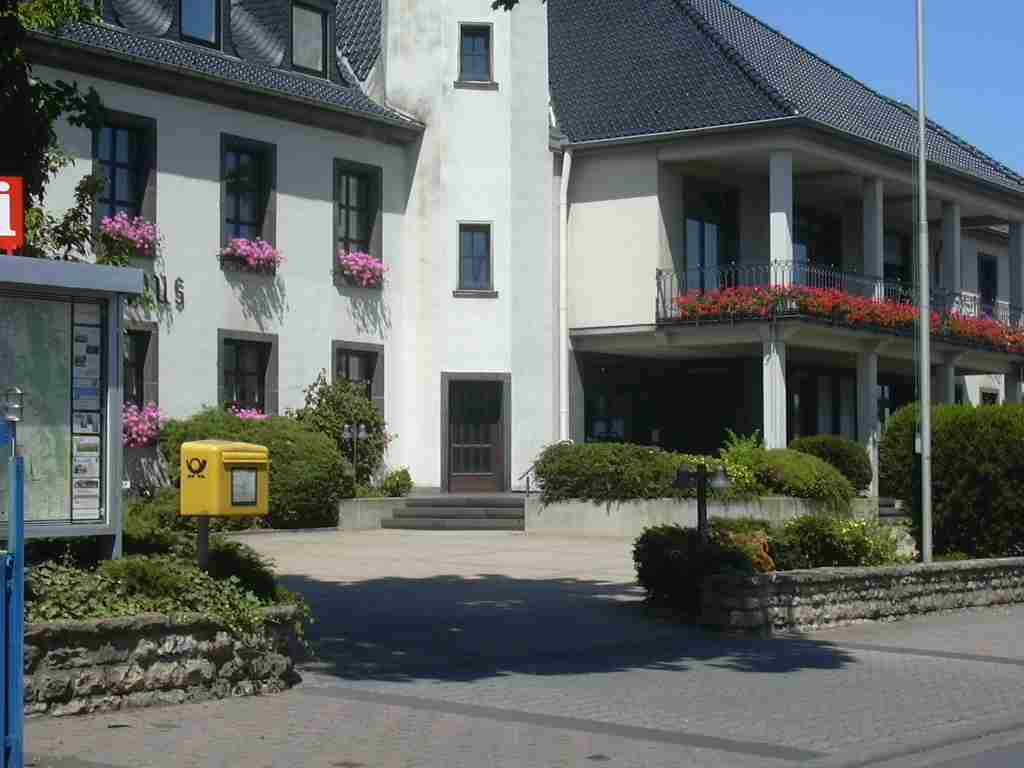 Kreuzau Rathaus Own Work papa1234 2006-07-14